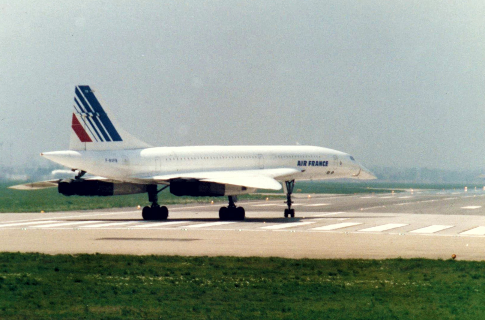 L'aeromobile che il 18 aprile 1987 atterrò e decollò dal Guglielmo Marconi.